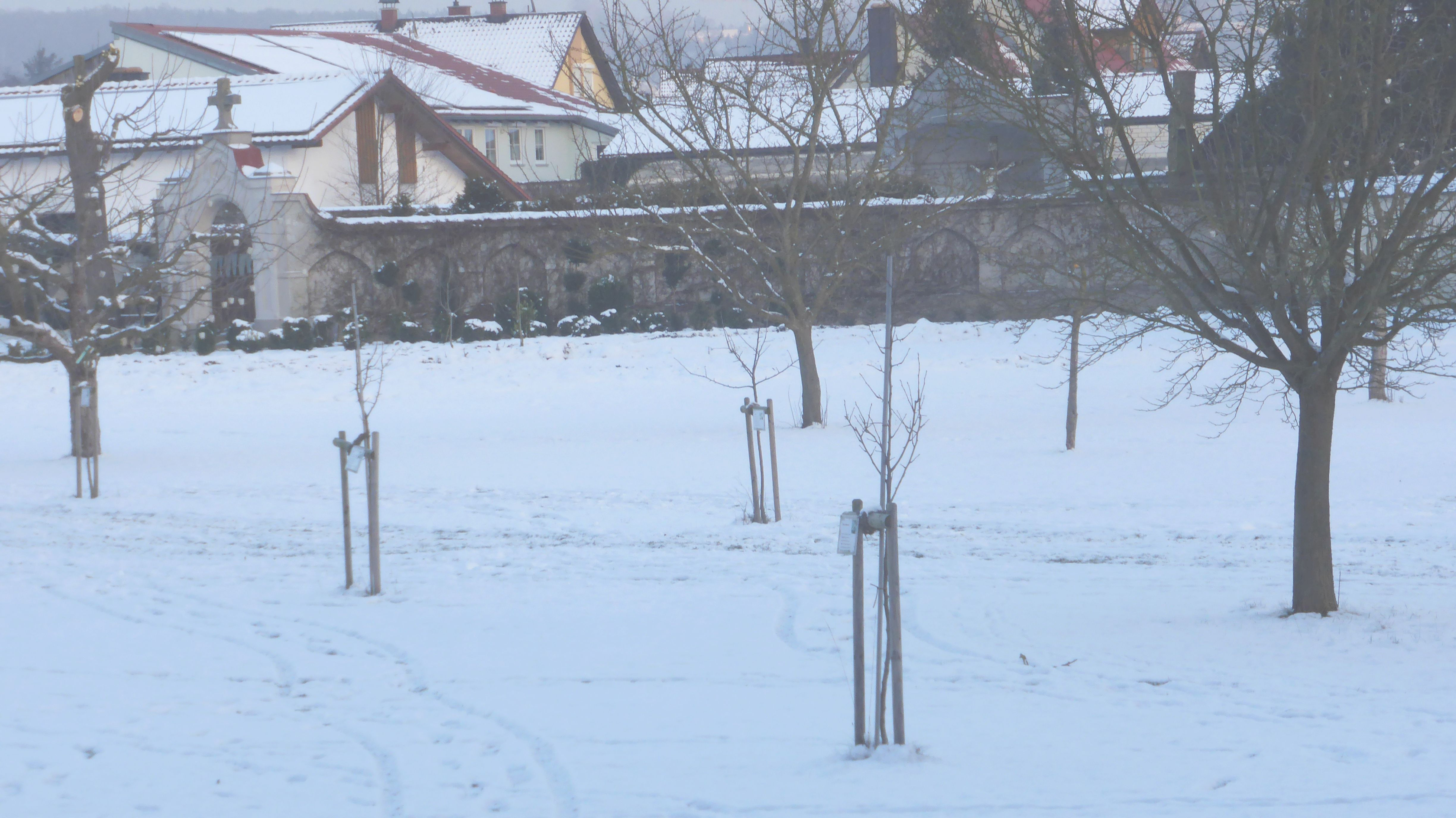 Neues Schloss Ettmannsdorf - Garten mit Mauer